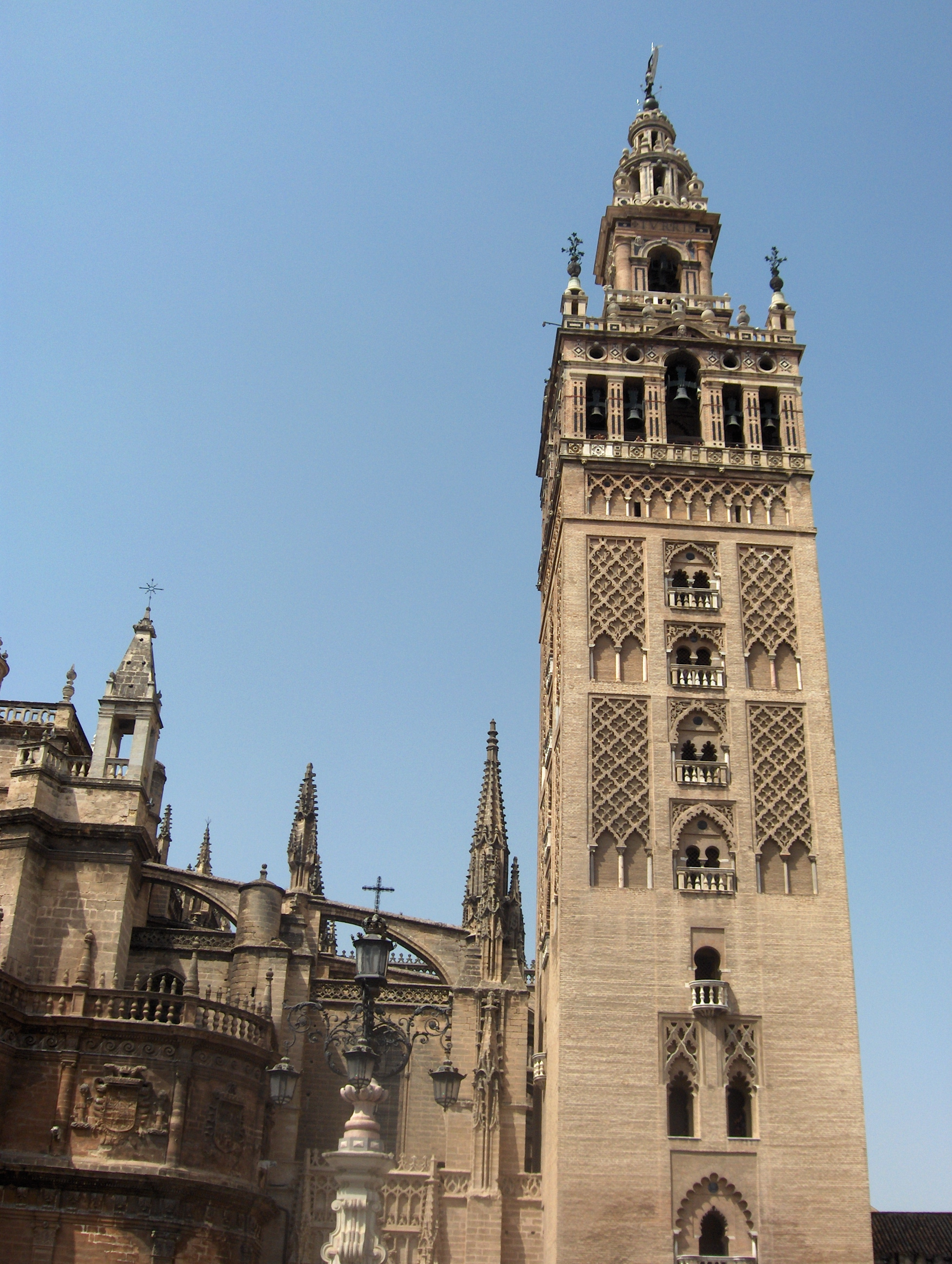 La Giralda, en Sevilla (España)